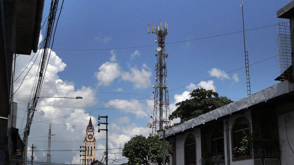 Antena de las oficinas de Movistar en Iquitos.